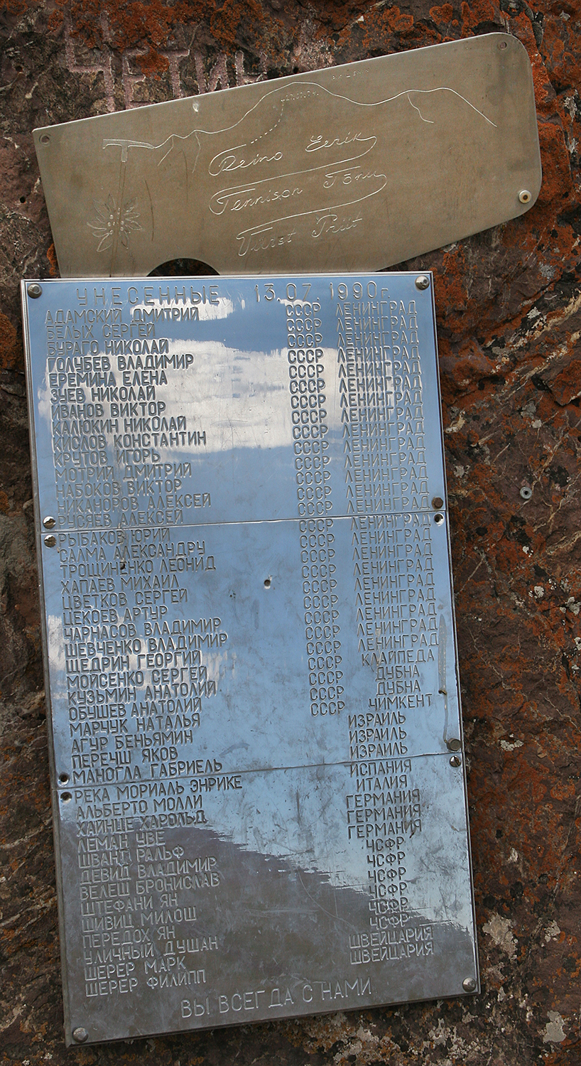 Leninil hukkunud